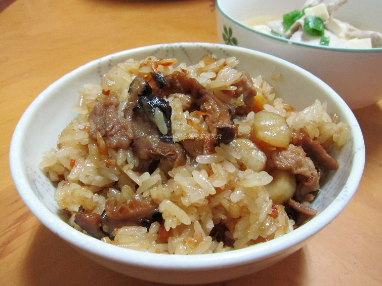 櫻花蝦油飯